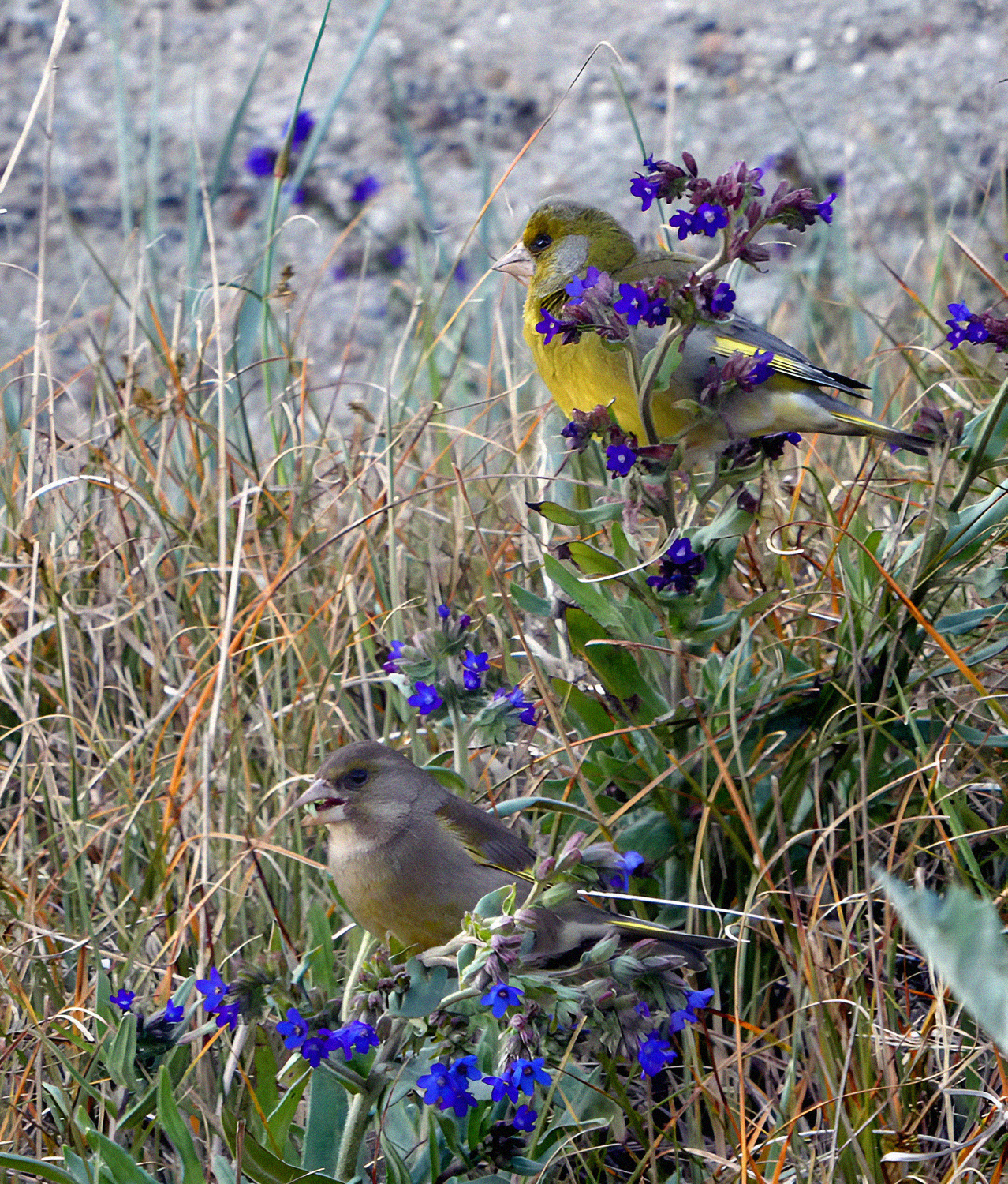 Ett adult par som födosöker, hanen överst. Ystad 2020.